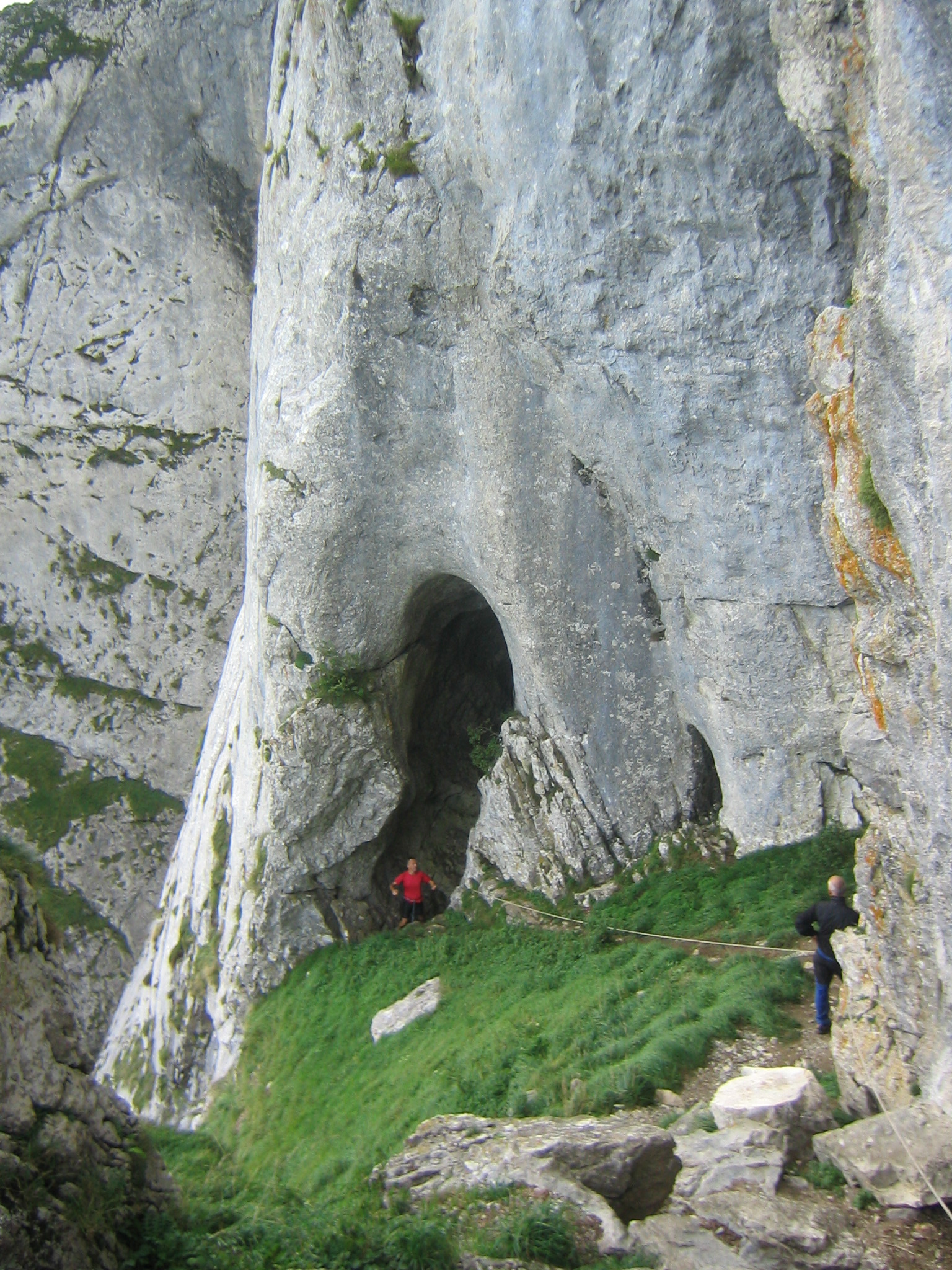 Entrada a la cueva de Mari. (Duranguesado)Vizcaya, País Vasco, España.